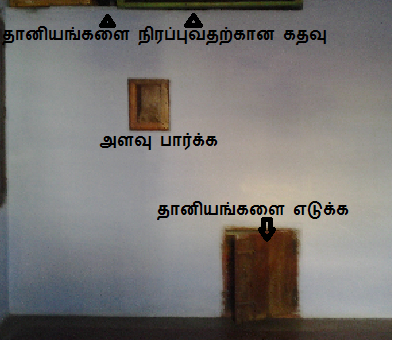 Granary room in tenkasi